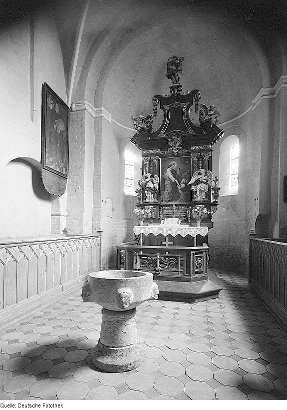 Original image description from the Deutsche FotothekAltenkirchen. Inneres, Chor nach Nordosten mit Taufstein (um 1250) und Altar (1724, E. Keßler)